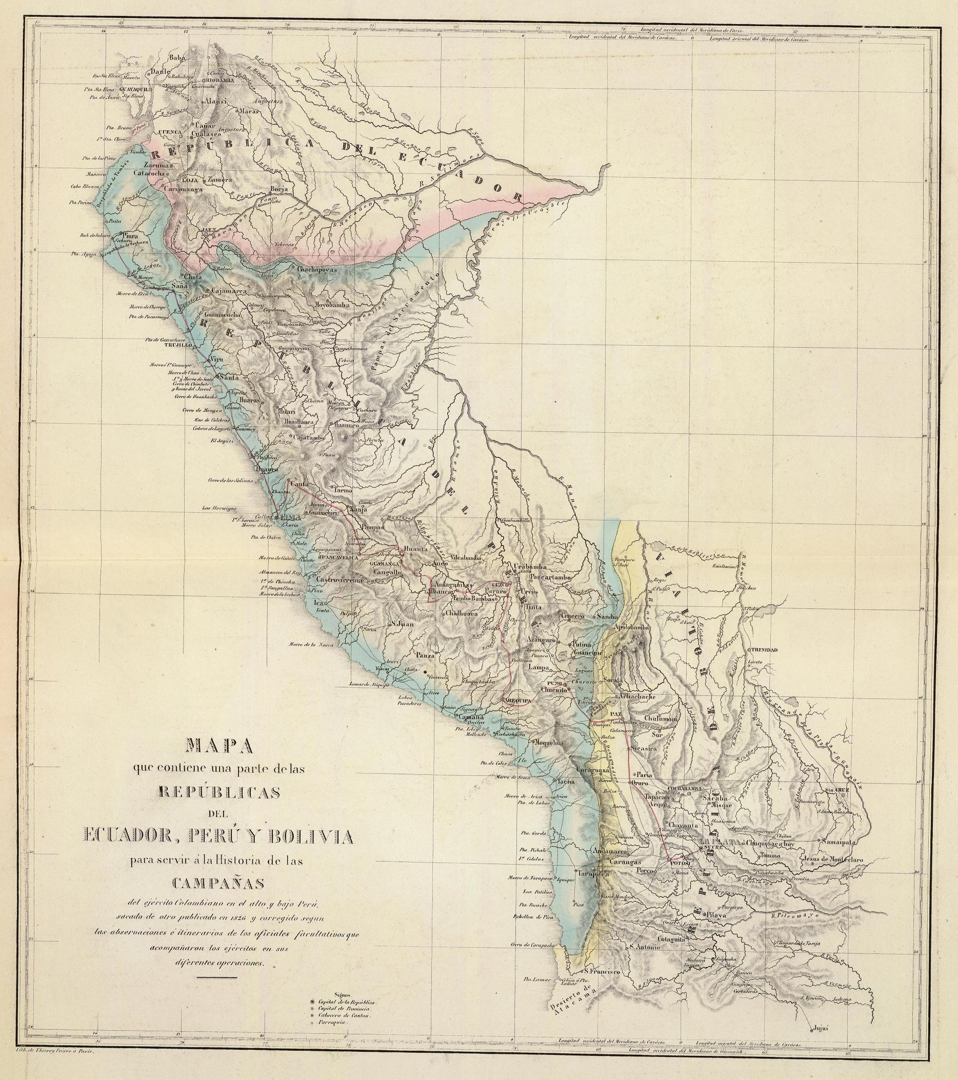 Mapa de las repúblicas de Ecuador, Perú y Bolivia para servir a la historia de las campañas de independencia 1823 - 1826